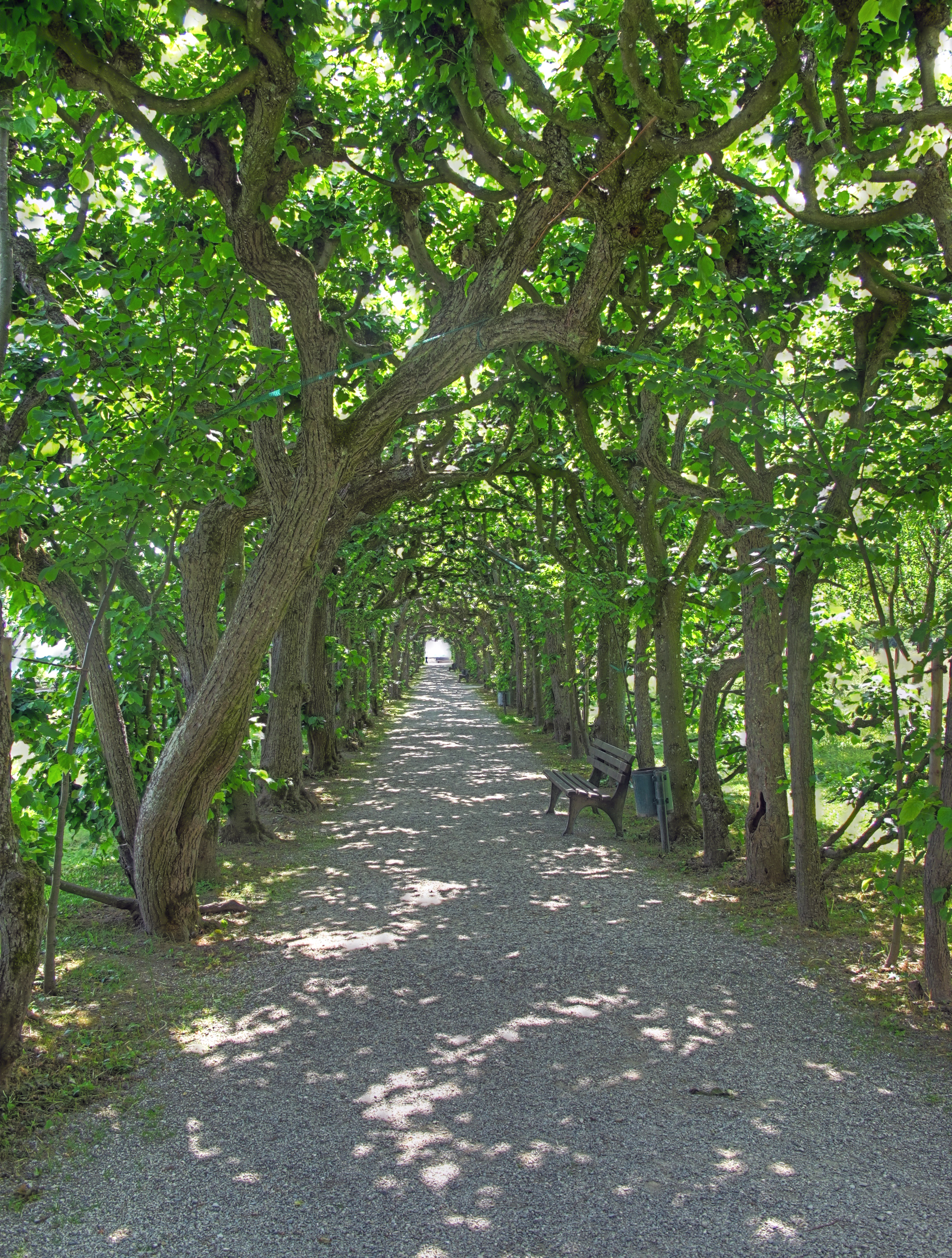 Deutschland, Bayern, Dachau, Schlossgarten, Lindenalle, HDR-Image